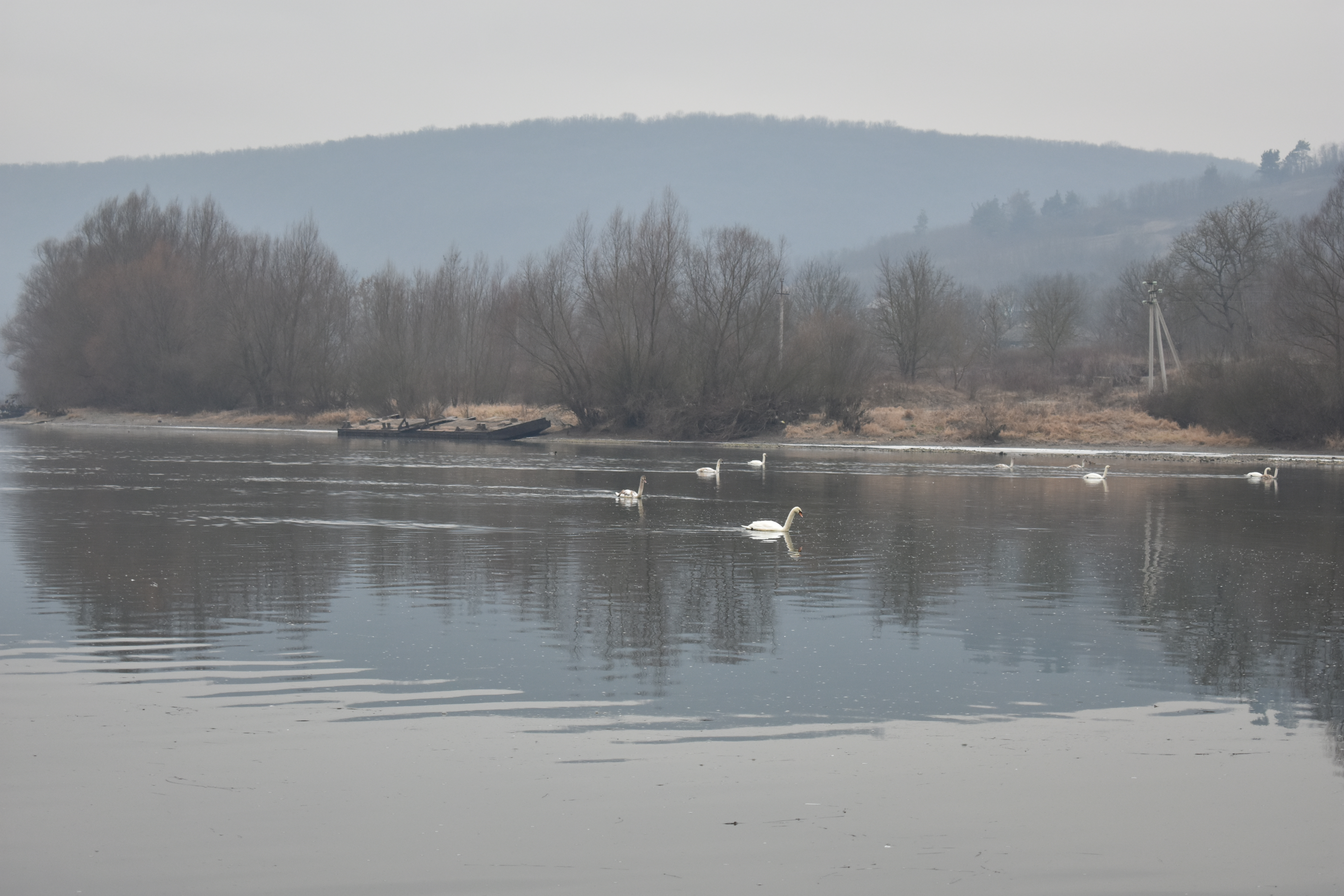 РЛП Дністер між Могилів-Подільським і Бронницею